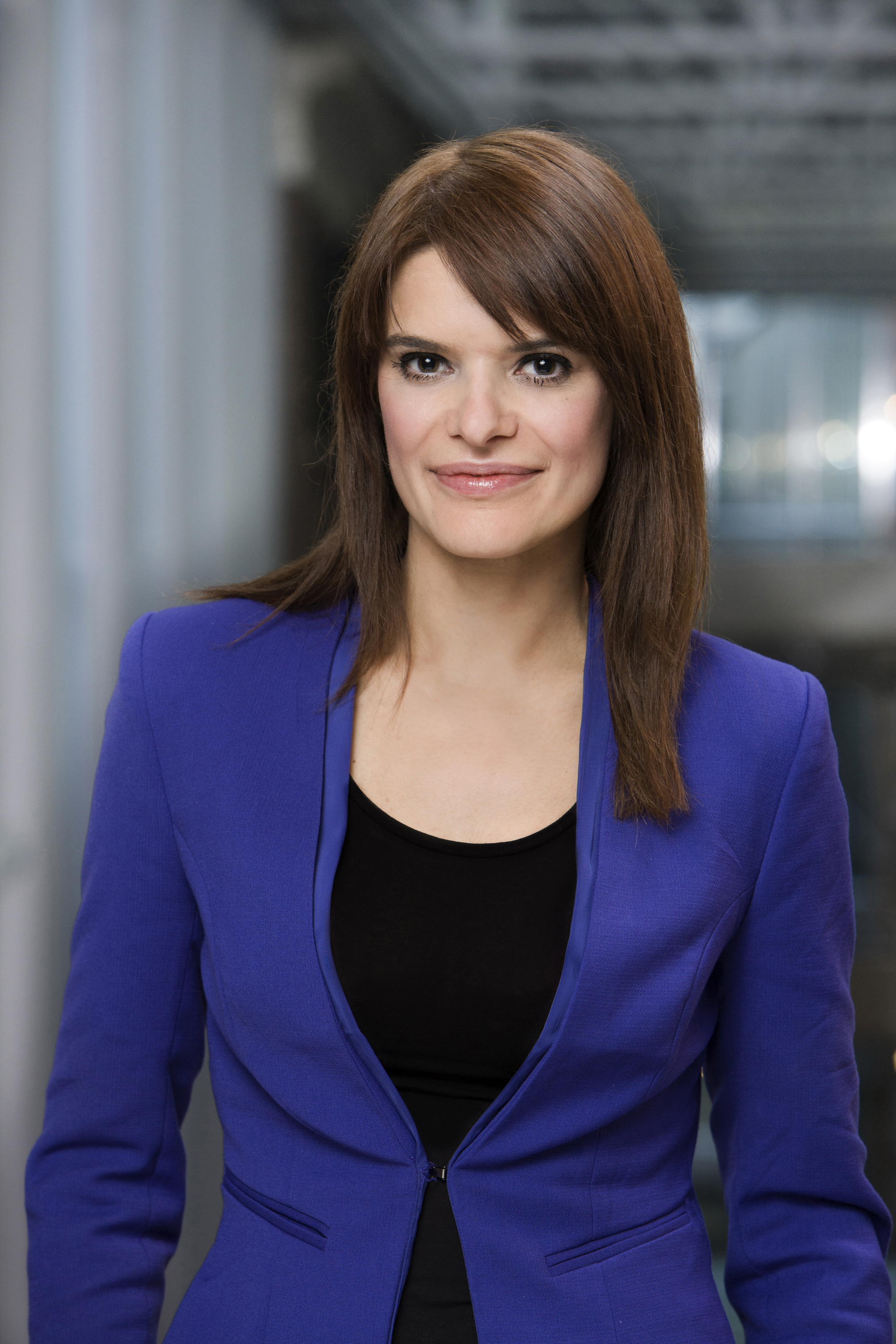 Barbara Visser (Šibenik (Kroatië), 16 augustus 1977) is een Nederlands politica.